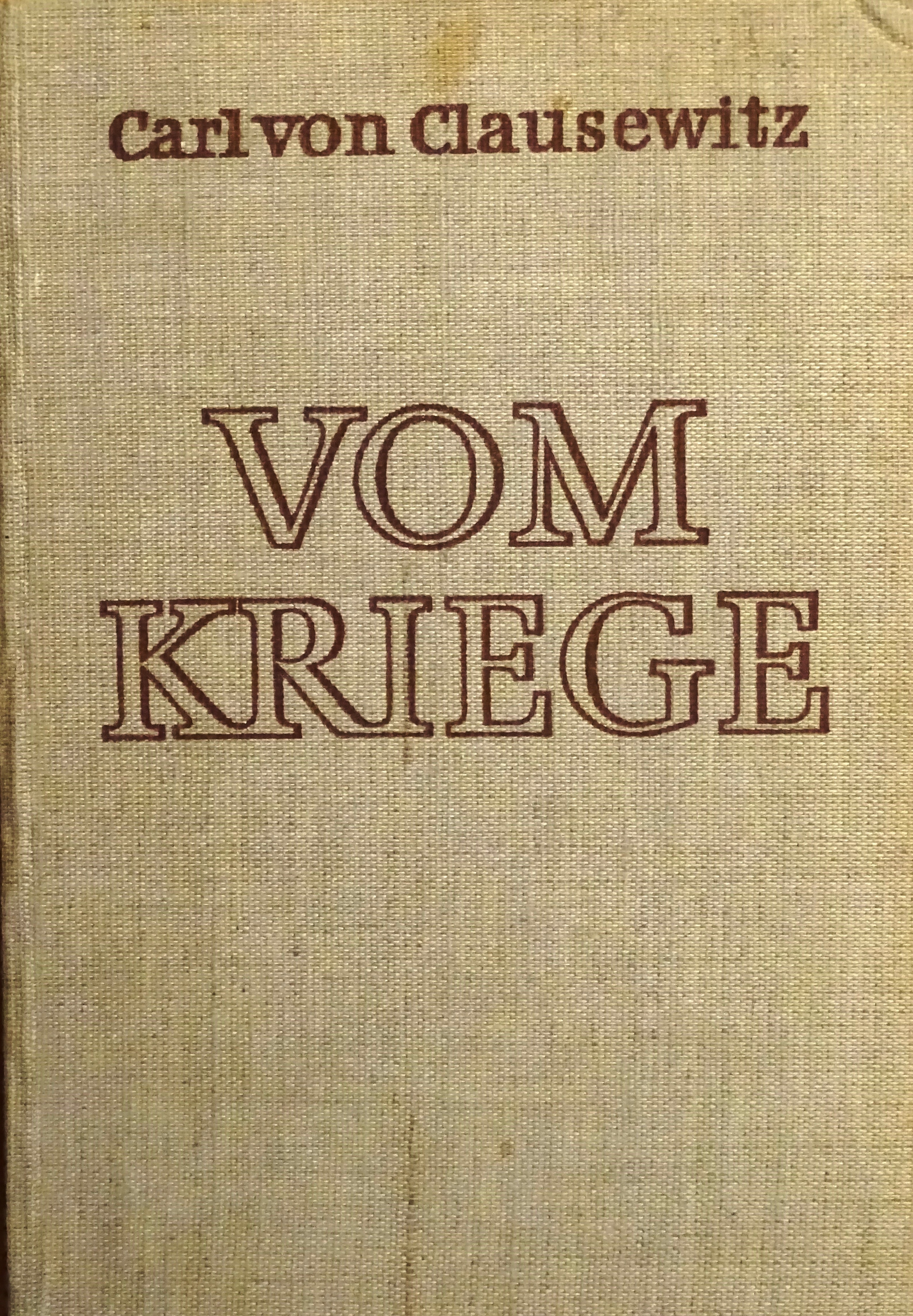 Umschlagtitel, Vom Kriege, Hinterlassenes Werk des Generals Carl von Clausewitz. Eingeleitet von Prof. Dr. Ernst Engelberg und Generalmajor a. D. Dr. Otto Korfes, Verlag des MfNV, Berlin 1957.